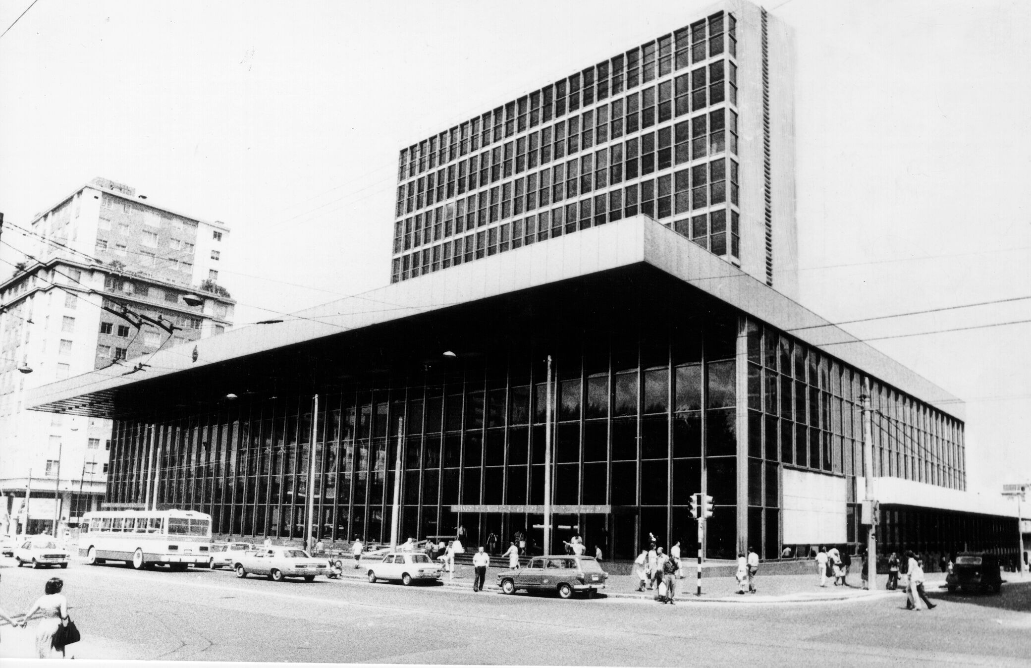 Fotografía de la sede 19 de Junio del Banco de la República Oriental del Uruguay, Montevideo, Uruguay